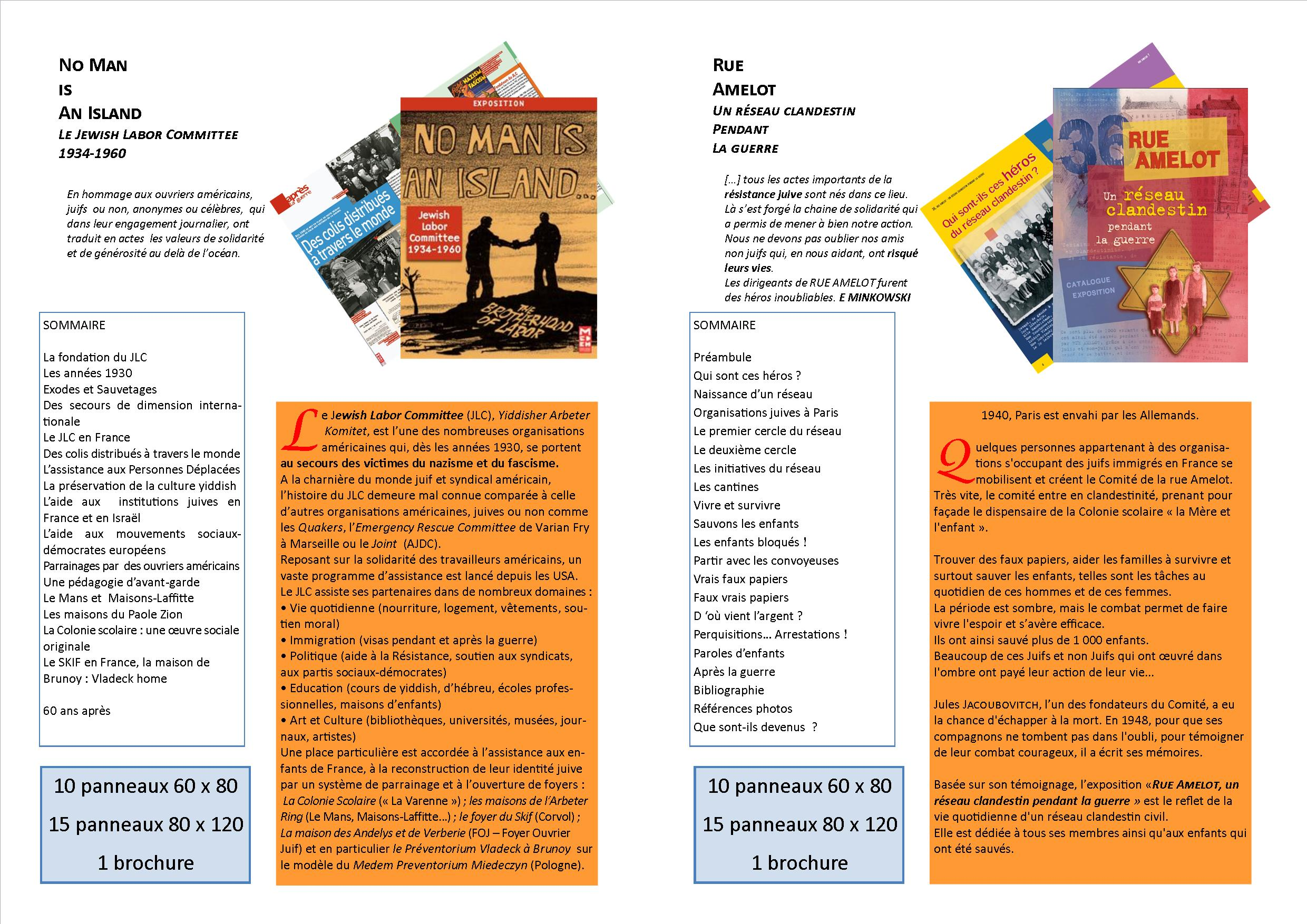 Quelques une des expositions crées par le Centre Medem-Arbeter Ring